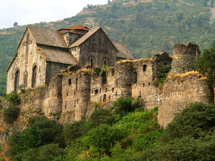 Монастырь Ахтала